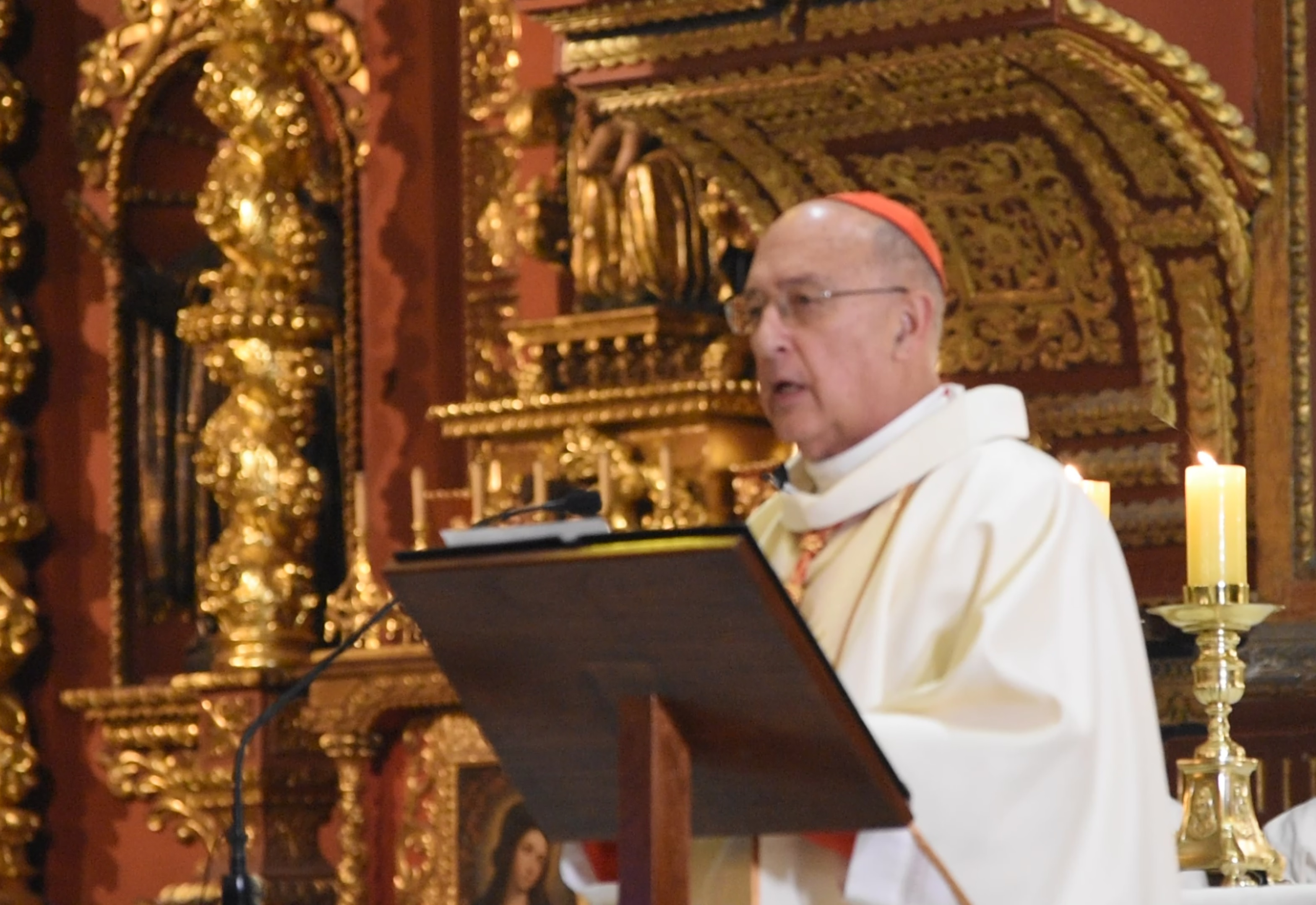 Cardenal Pedro Barreto Jimeno, S.J. durante su homilía en la eucaristía por la fiesta de San Ignacio de Loyola, fundador de la Compañía de Jesús, en la Iglesia San Pedro de Lima.